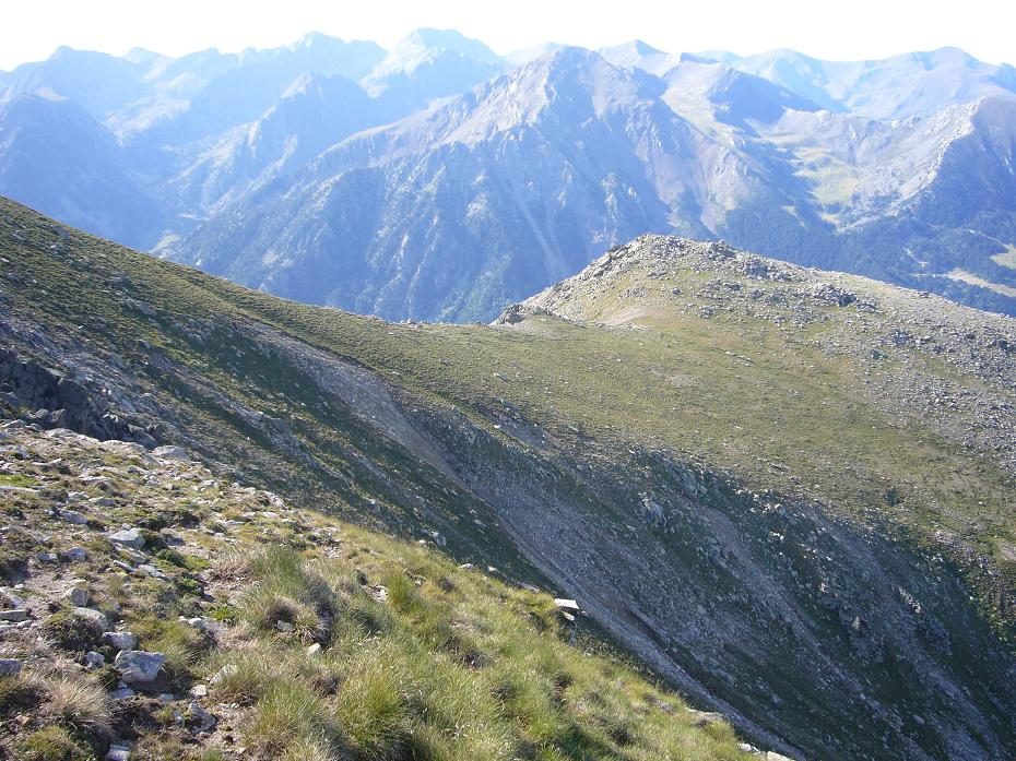 Coll i Tuc de Coll Arenós, vistos des dels Pics de Comaltes; la Vall de Boí, Alta Ribagorça, Catalunya